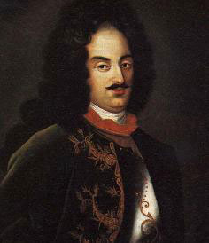 Pyotr Petrovich Tolstoi